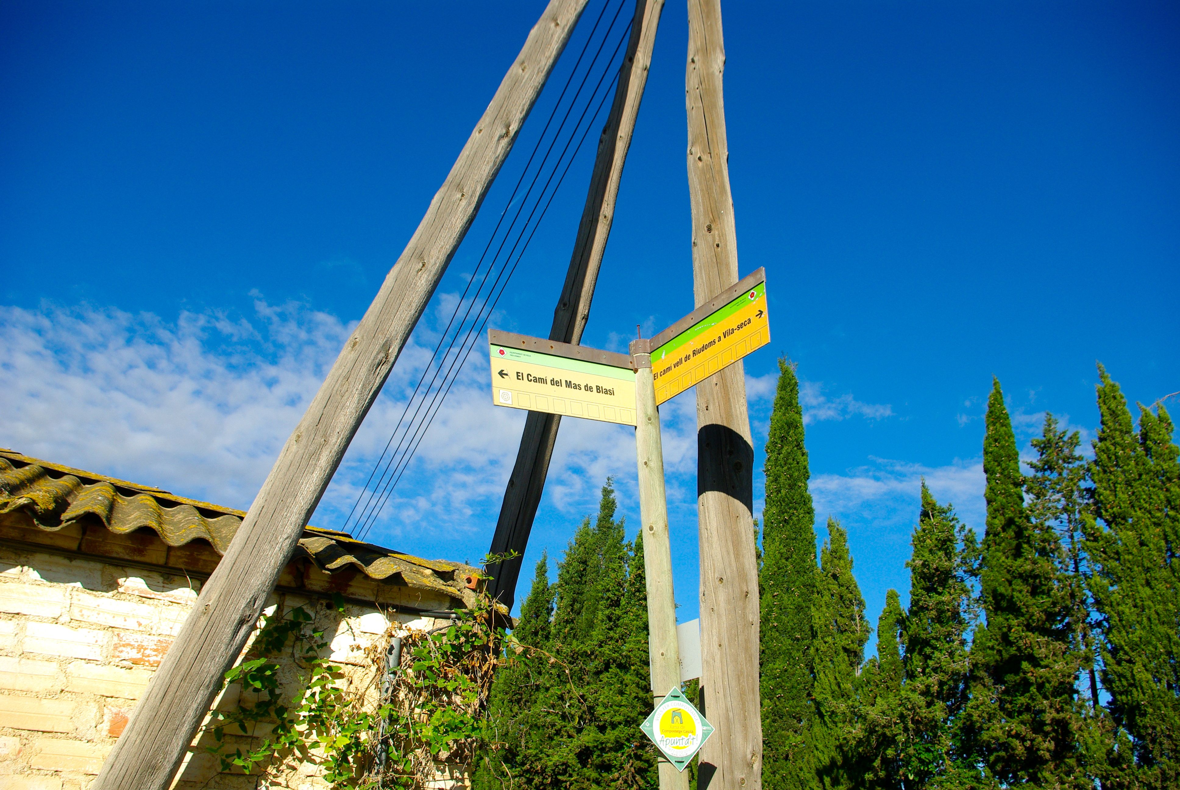 El camí del Mas del Blasi quan s'encreua amb el camí de Riudoms a Vilaseca